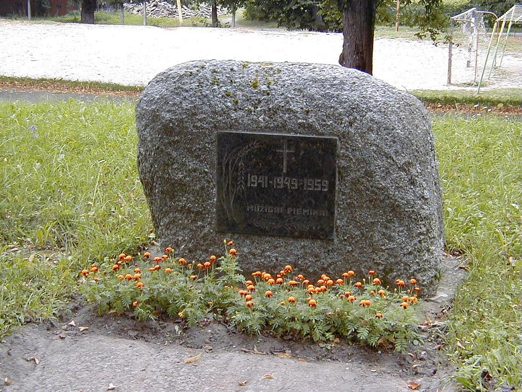 Kusa, piemineklis represētajiem 2001-08-25